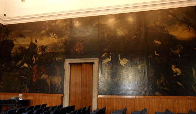 Mito di Orfeo, Sala del Grechetto, Palazzo Sormani Andreani (Milan)